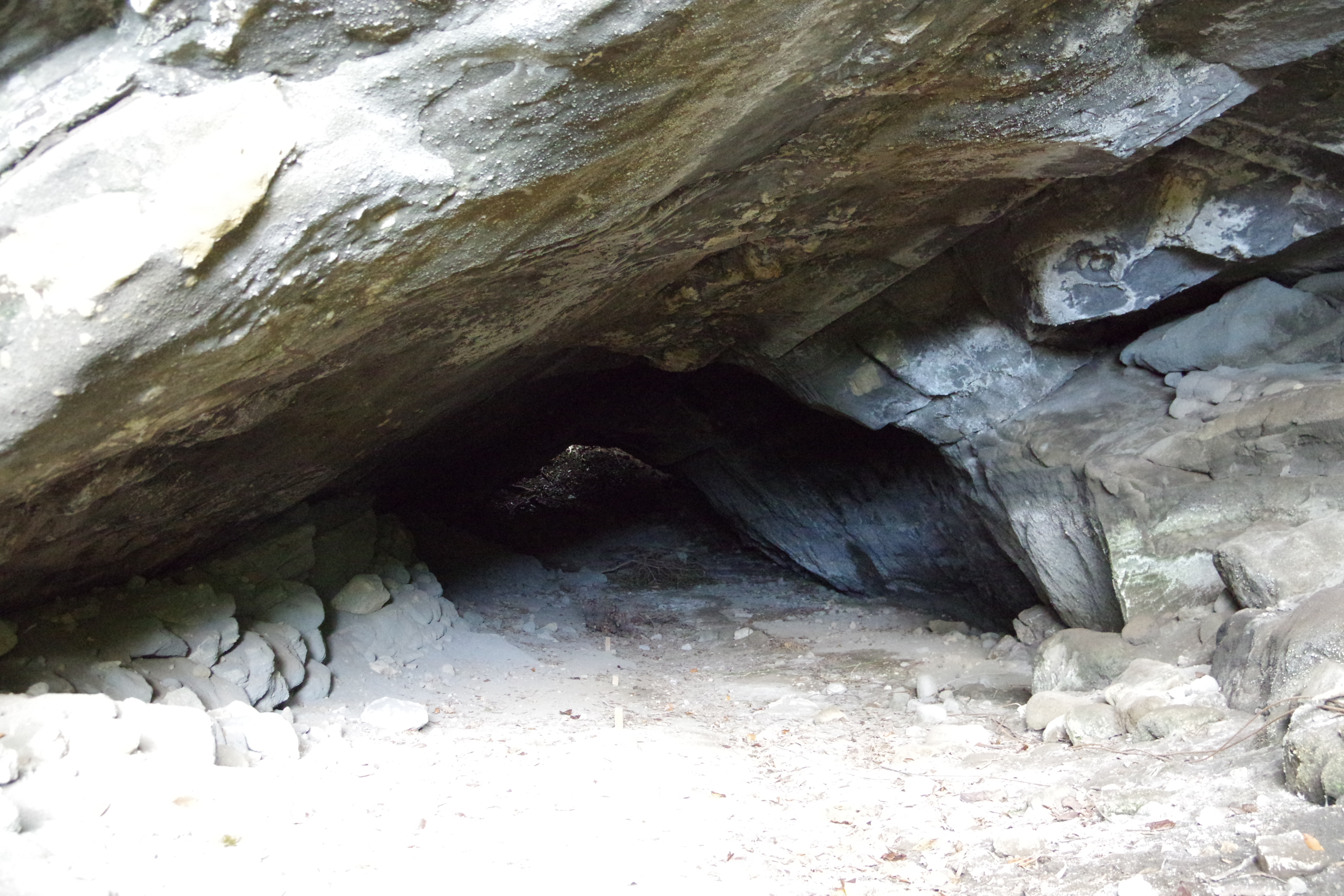 2020.2.22撮影